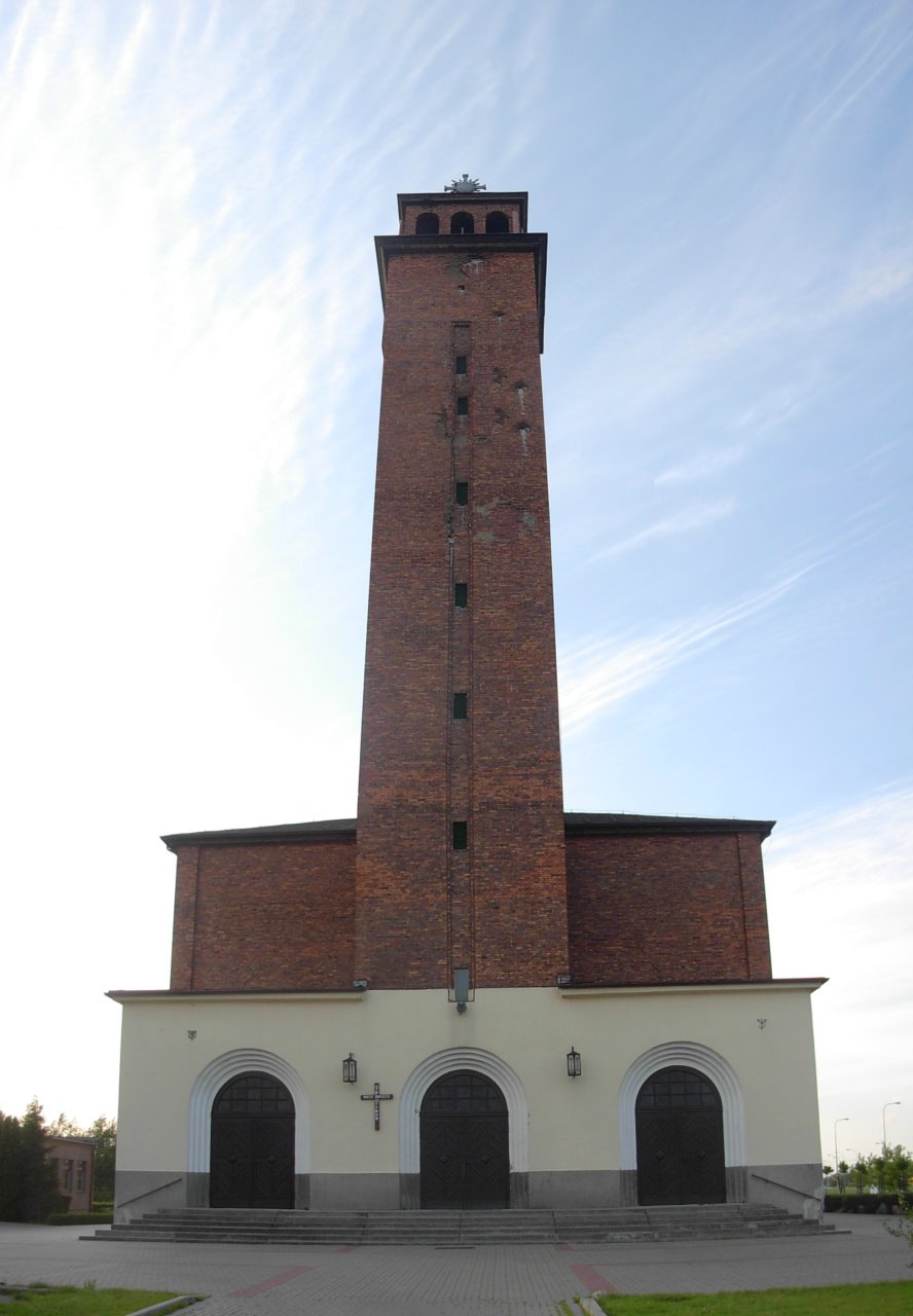 Kościół św Antoniego w Bydgoszczy.